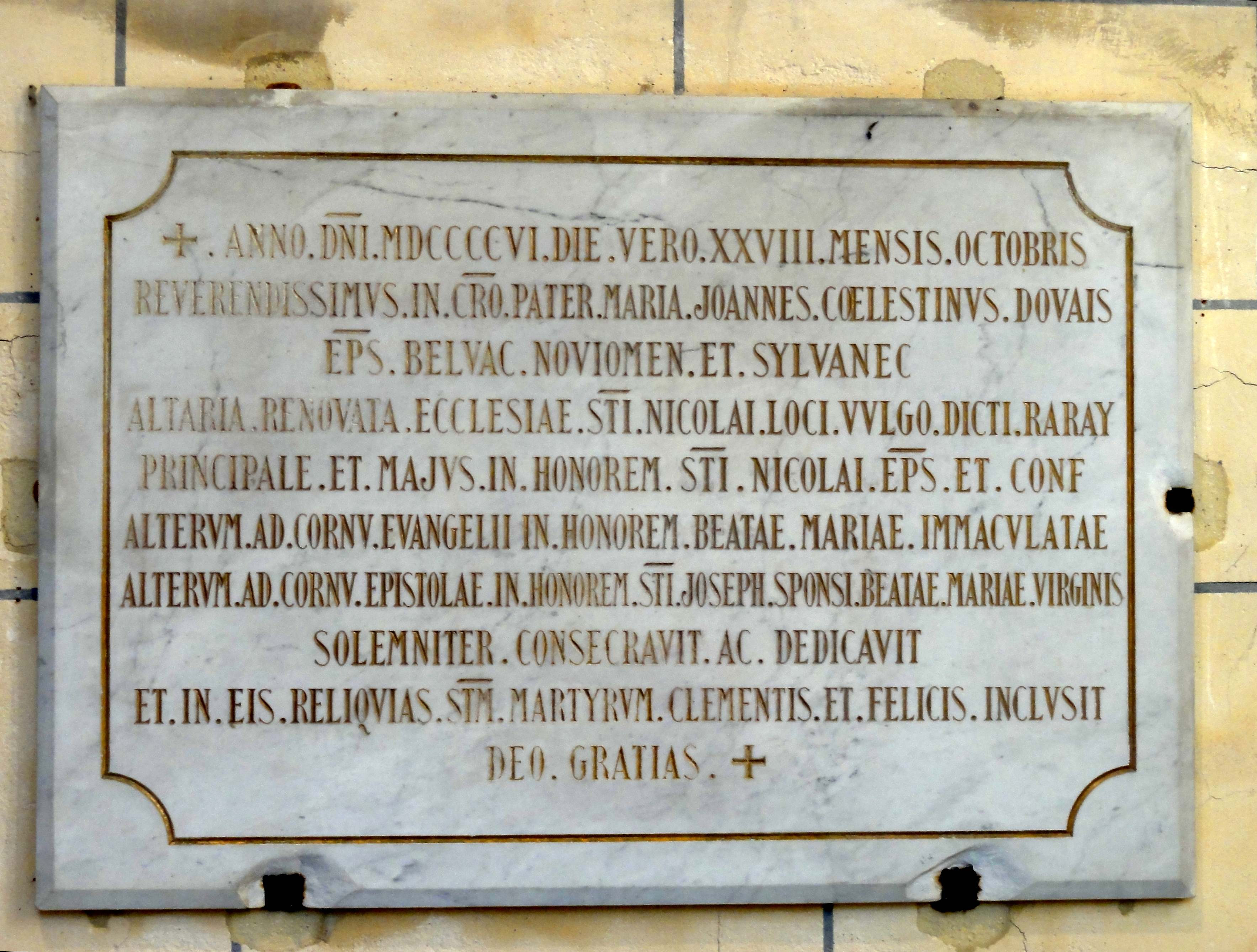 Chœur, plaque commémorative de la nouvelle consécration le 28 octobre 1806.